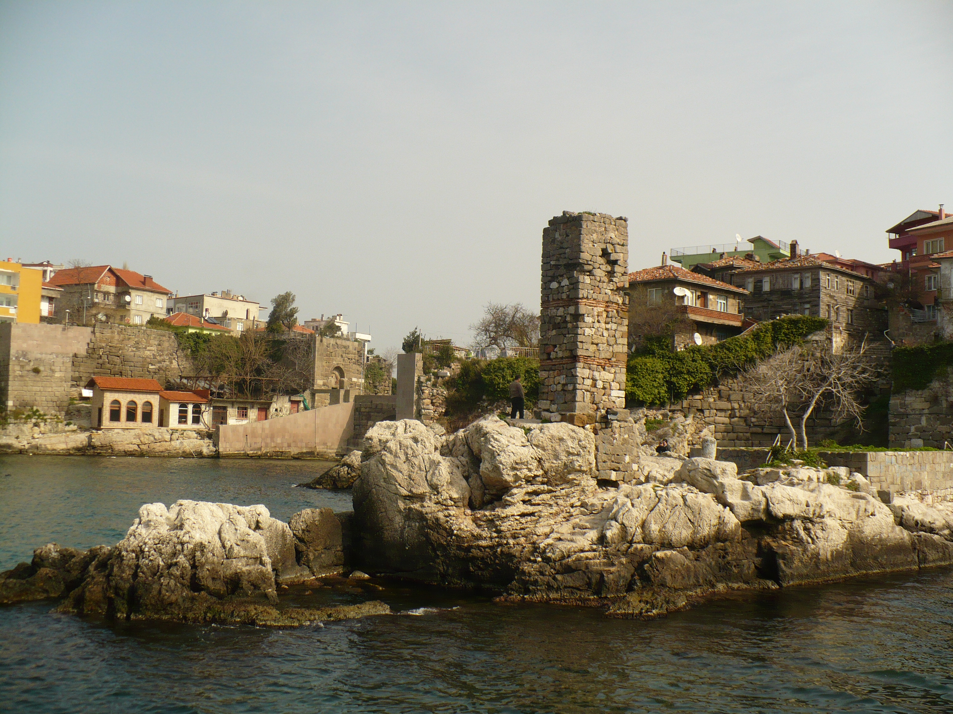 Amasra'dan bir görüntü